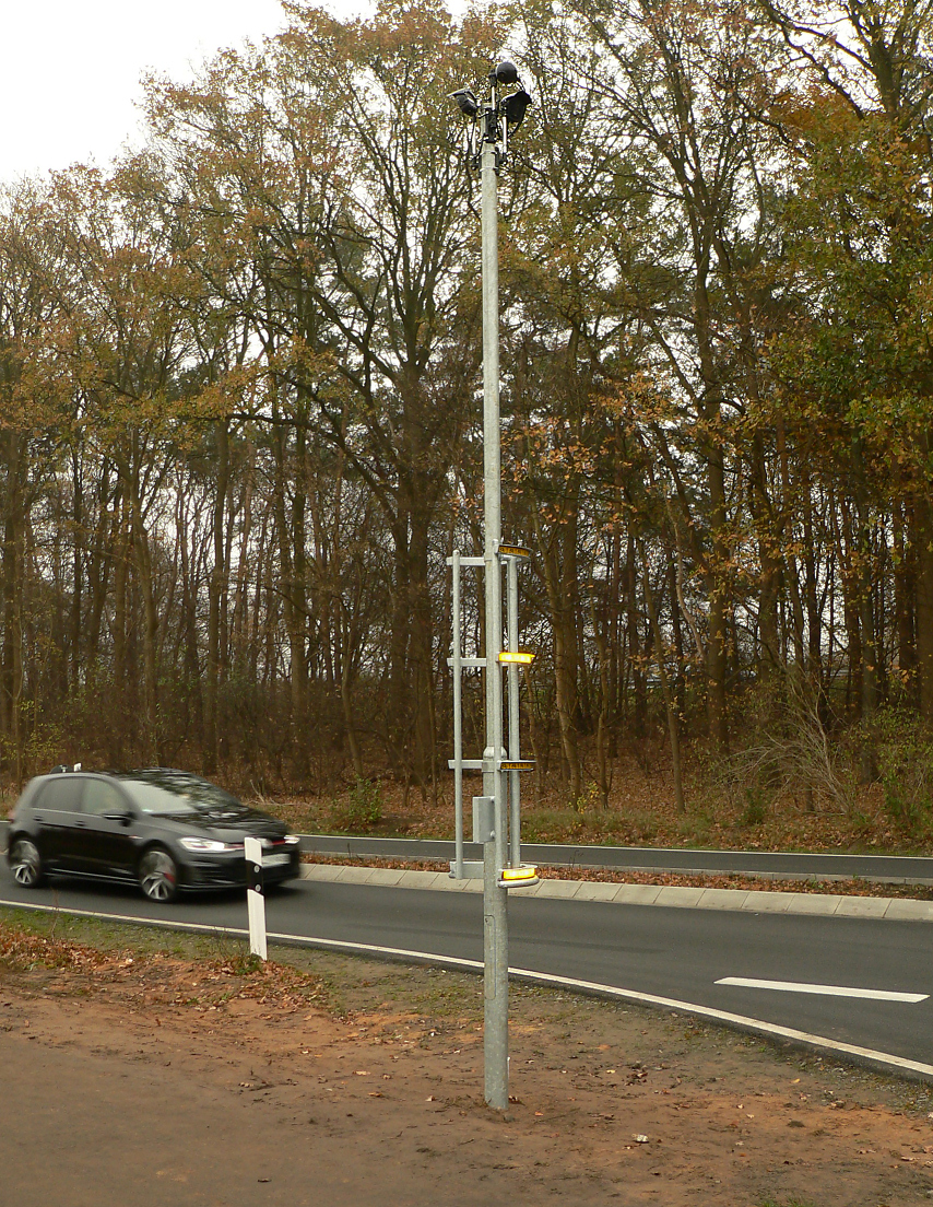 Bike-Flash Garbsen Burgstraße